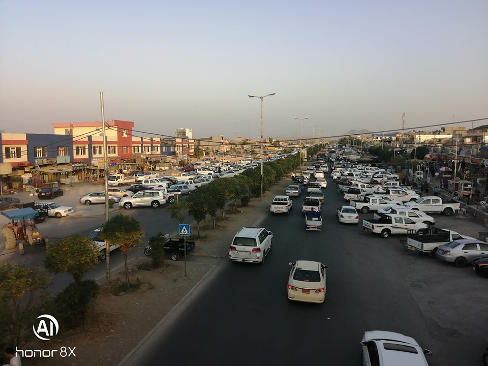 کوردی: دیمەنێکی شارۆچکەی زەڕایەن